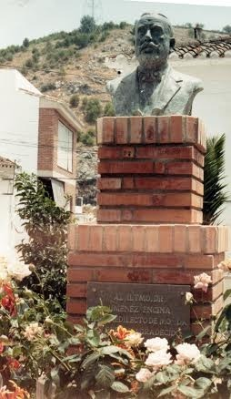 Busto doctor Cristobal Jimenez Encina en Monda